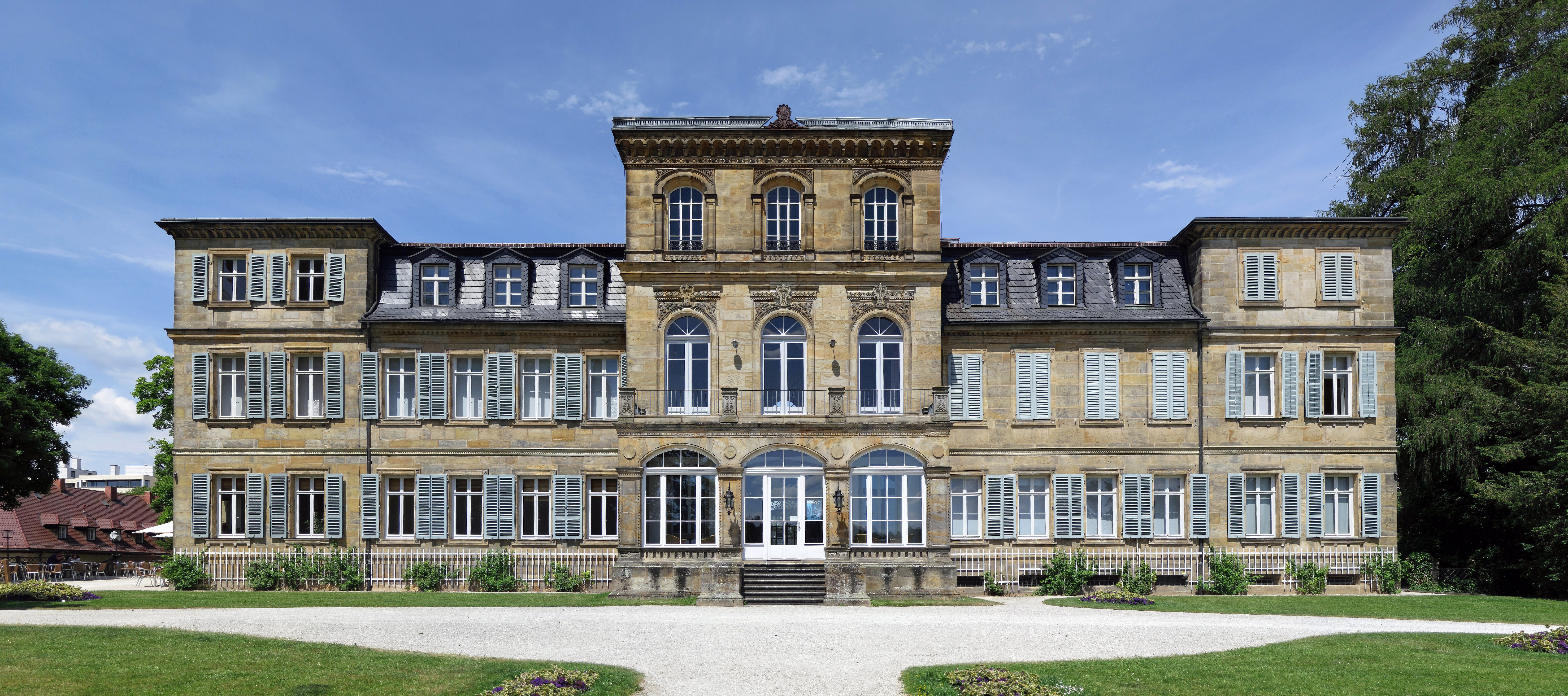 Das Schloss Fantaisie (südliche Seite, Parkseite) steht etwa fünf Kilometer von Bayreuth, in Eckersdorf-Donndorf. Erbaut wurde das Schloss von 1761 bis 1765. 1850/52 wurde es in seiner noch heute bestehenden Form umgebaut. Im Schlossgebäude befindet sich das im Jahr 2000 eingerichtete, erste Gartenkunstmuseum Deutschlands. Betreut wird das Schloss von der Bayerischen Schlösserverwaltung.